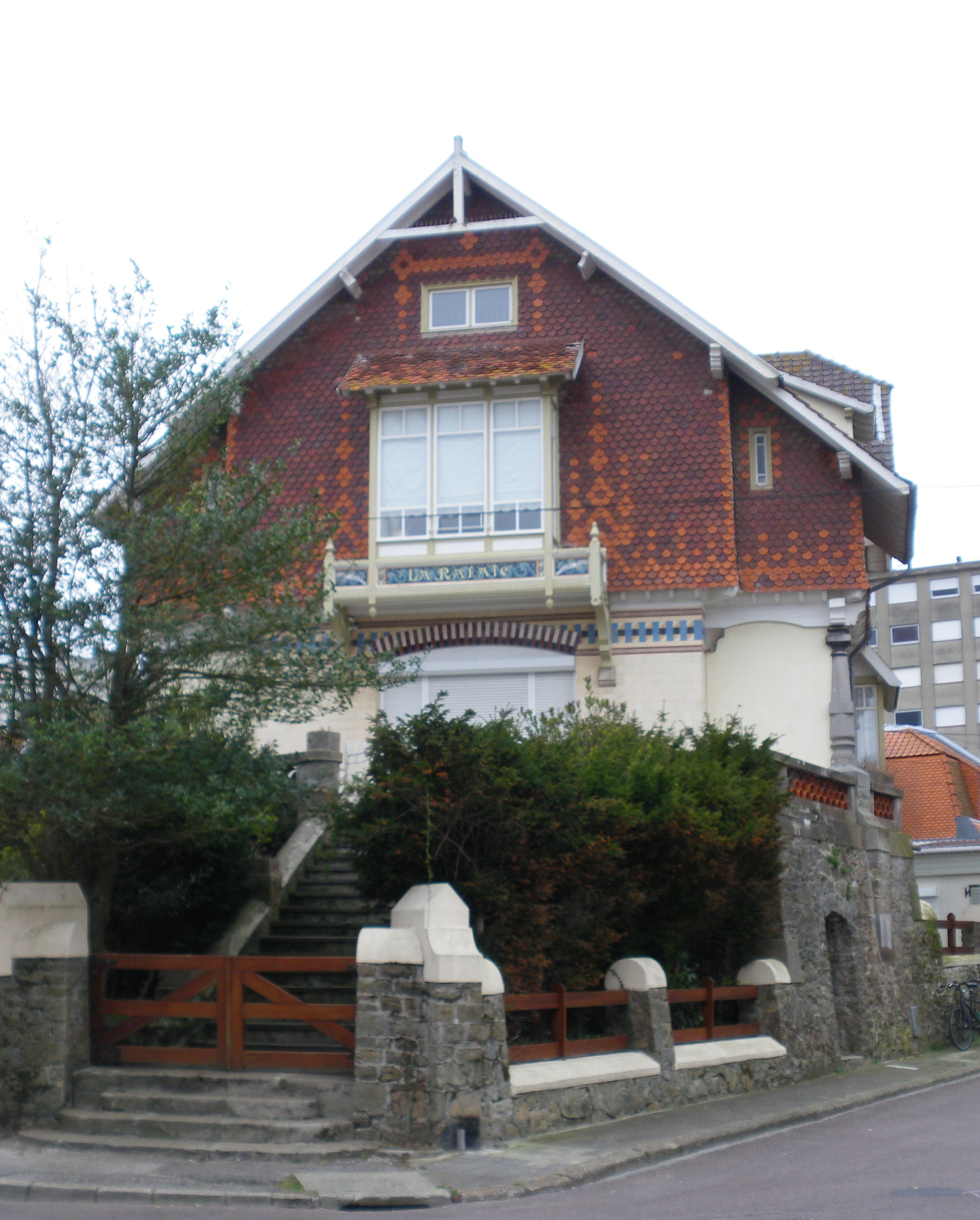 Vue de la villa la Rafale, située à l'angle de l'avenue Louis-Hubert et de la rue des Dunes, au Touquet-Paris-Plage. La villa a été construite par Louis-Marie Cordonnier.